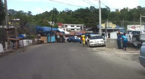 Straße in Brown's Town, Jamaika